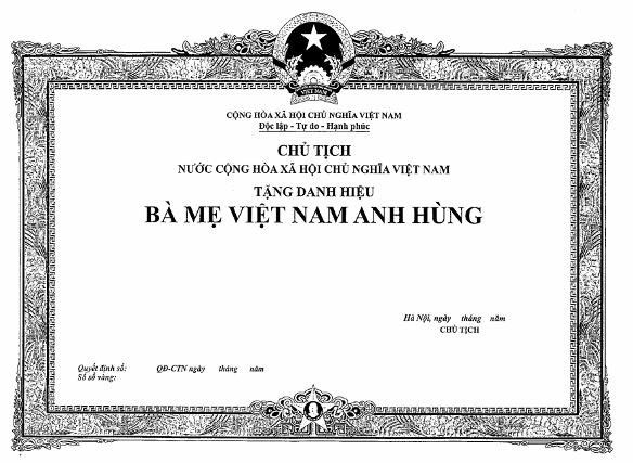 Bằng Bà mẹ Việt Nam Anh hùng